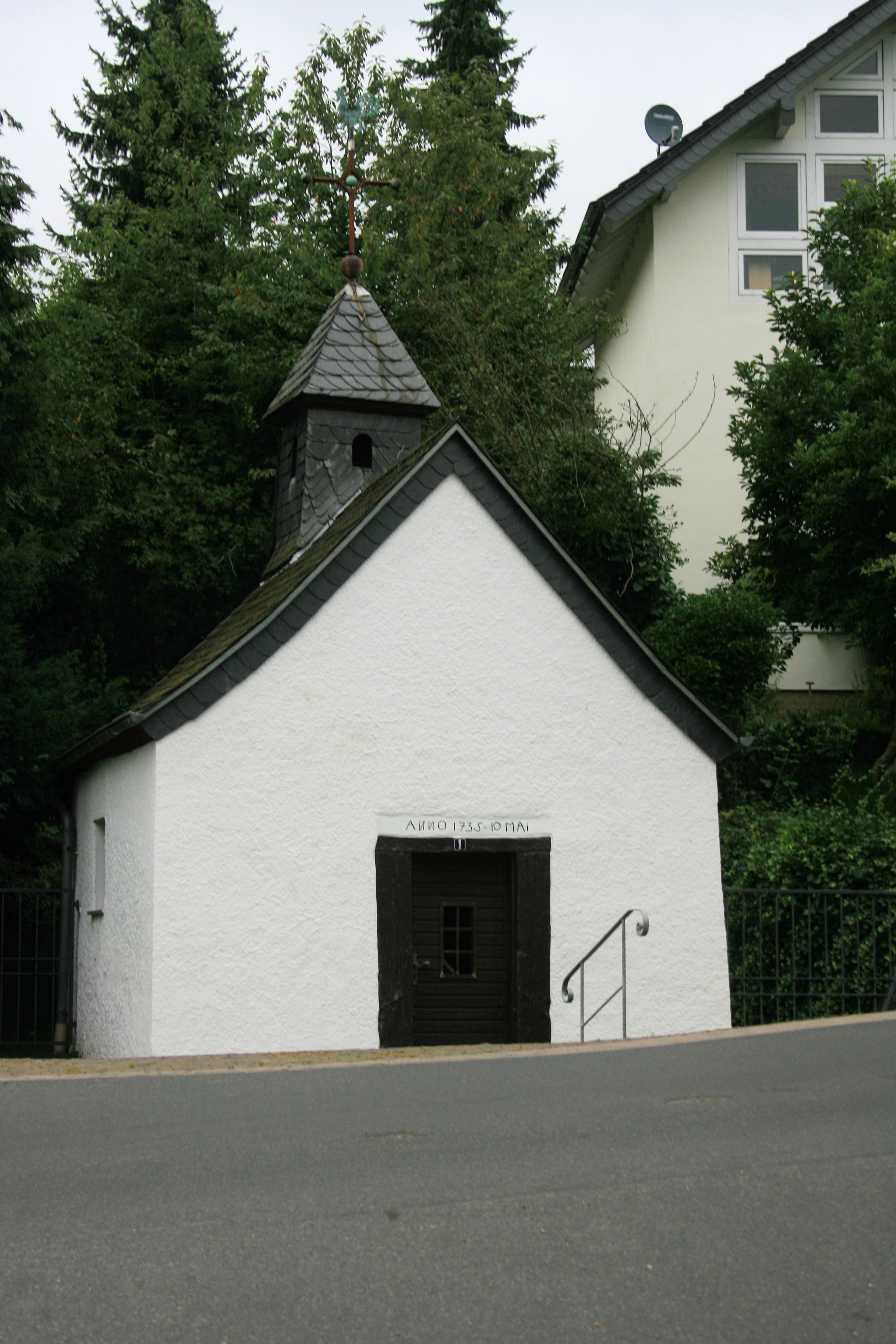 Kapelle Antonius von Padua, Zur Heide 1, Oberauel, Stadt Hennef (Sieg)